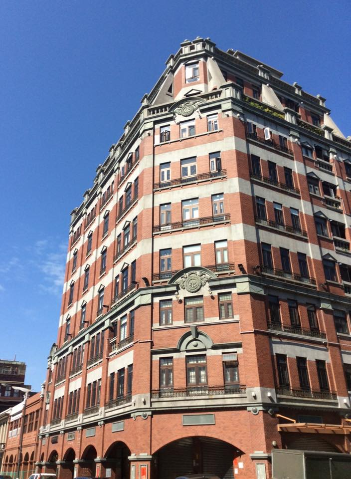 大稻埕復古新建大樓